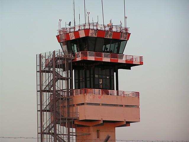 Torre di controllo aeroporto Ronchi dei Legionari, Trieste